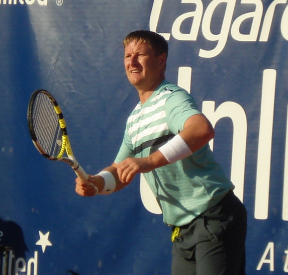 Yevgeny Kafelnikov en 2009 lors du Trophée Jean-Luc Lagardère